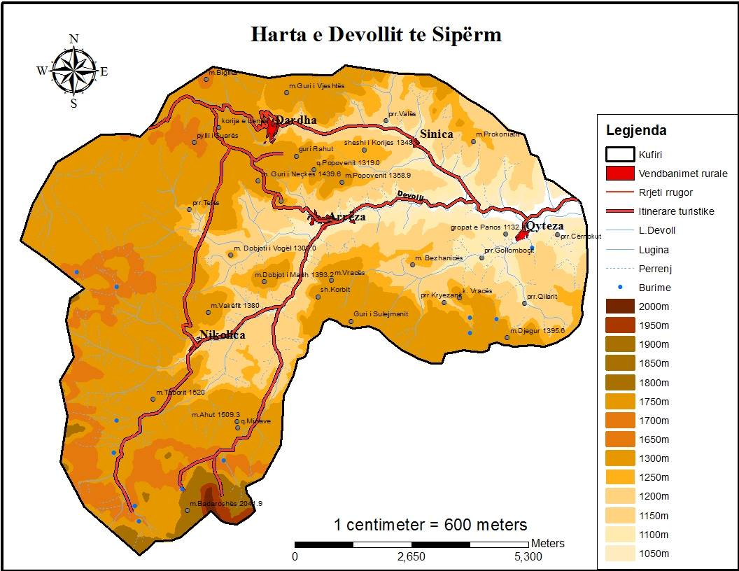 Harte Gjeografike, Arrëza dhe fshatrat e Devollit te Siperm